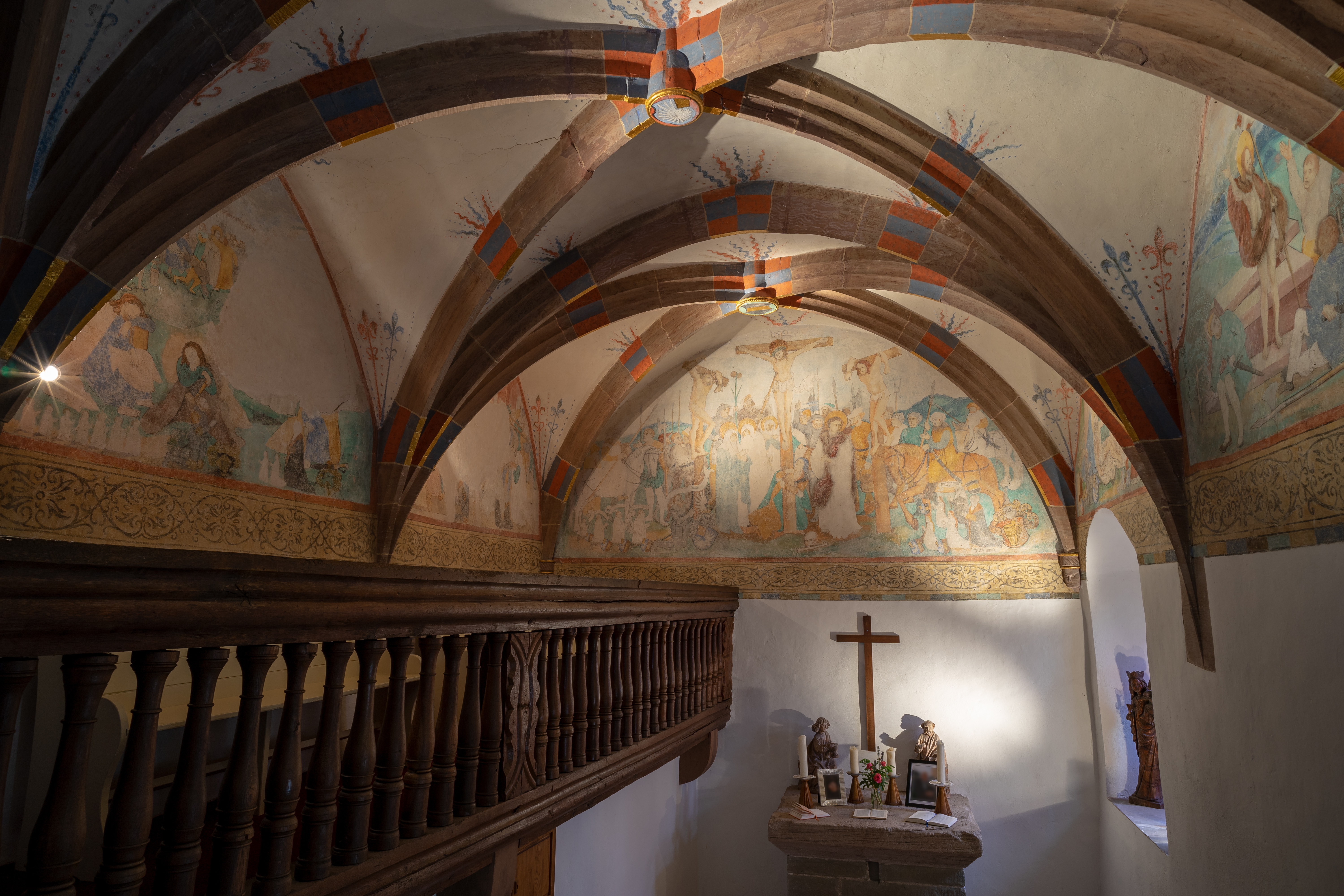 Vellberg: Die Schlosskapelle im sog. Unteren Schloss mit historischen Fresken, hier von der kleinen umlaufenden Empore aus gesehen. Die Kapelle stammt aus dem 14. Jahrhundert, der Freskenzyklus von 1549 zeigt die Passionsgeschichte – links Jesus auf dem Berg Getsemane, hinten die Kreuzigung, rechts die Auferstehung. Die Schlusssteine zeigen die Wappen der Burgherren. Die Aufnahme musste von der Empore aus gemacht werden, da das Erdgeschoss der Kapelle nicht zugänglich war (die Kapelle ist heute in Privatbesitz). Die beiden Fotos auf dem Altar wurden unscharf gemacht, da es sich um private Gedenkbilder handelt.